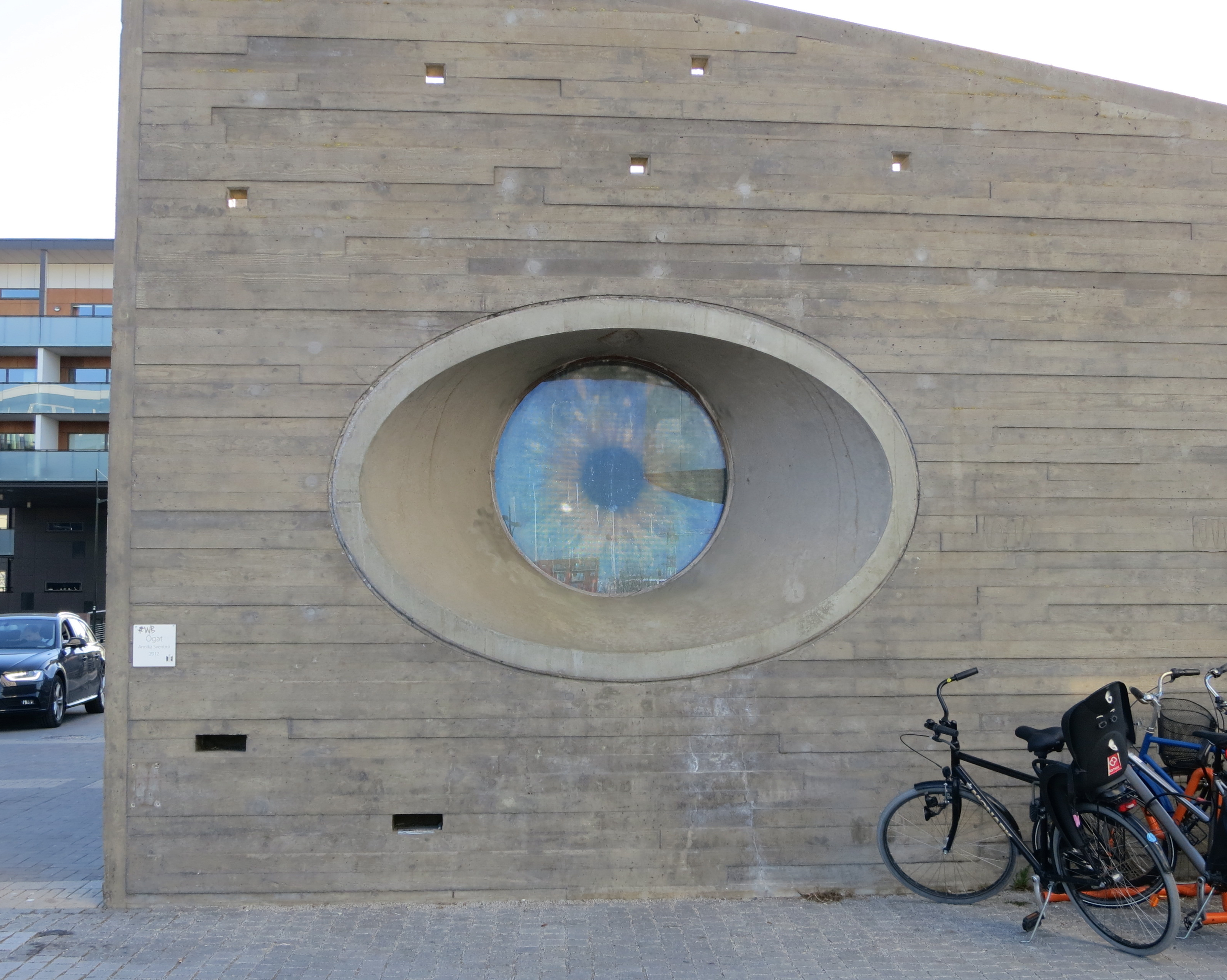 Ögat av Annika Svenbro, vid Turning Torso, Malmö